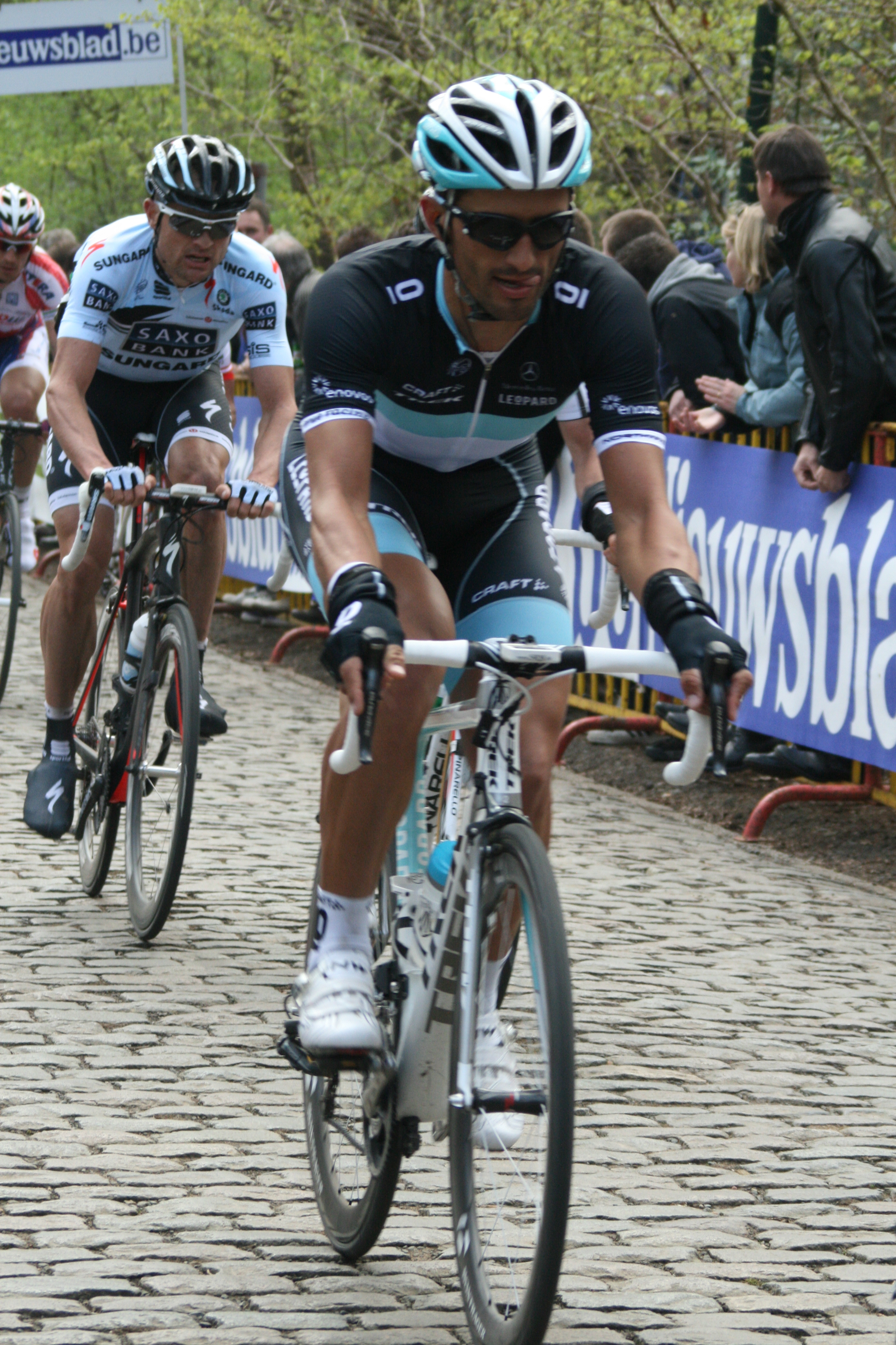 Gent-Wevelgem 2011, Kemmelberg